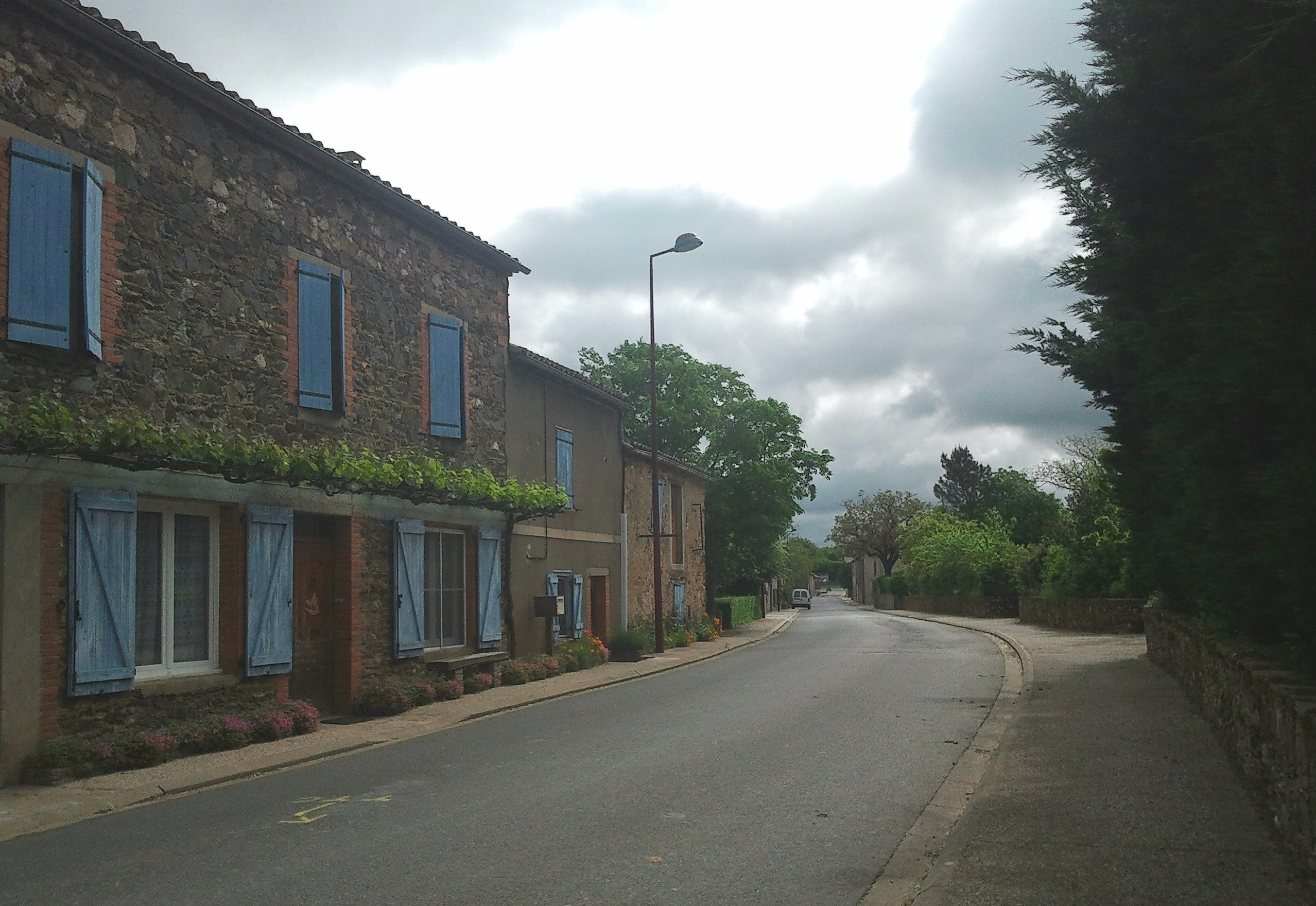 Rue principale (D138) de Saint-Antonin-de-Lacalm